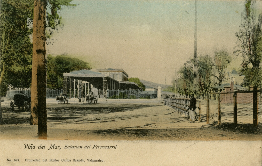 Estación de ferrocarriles de Viña del Mar.